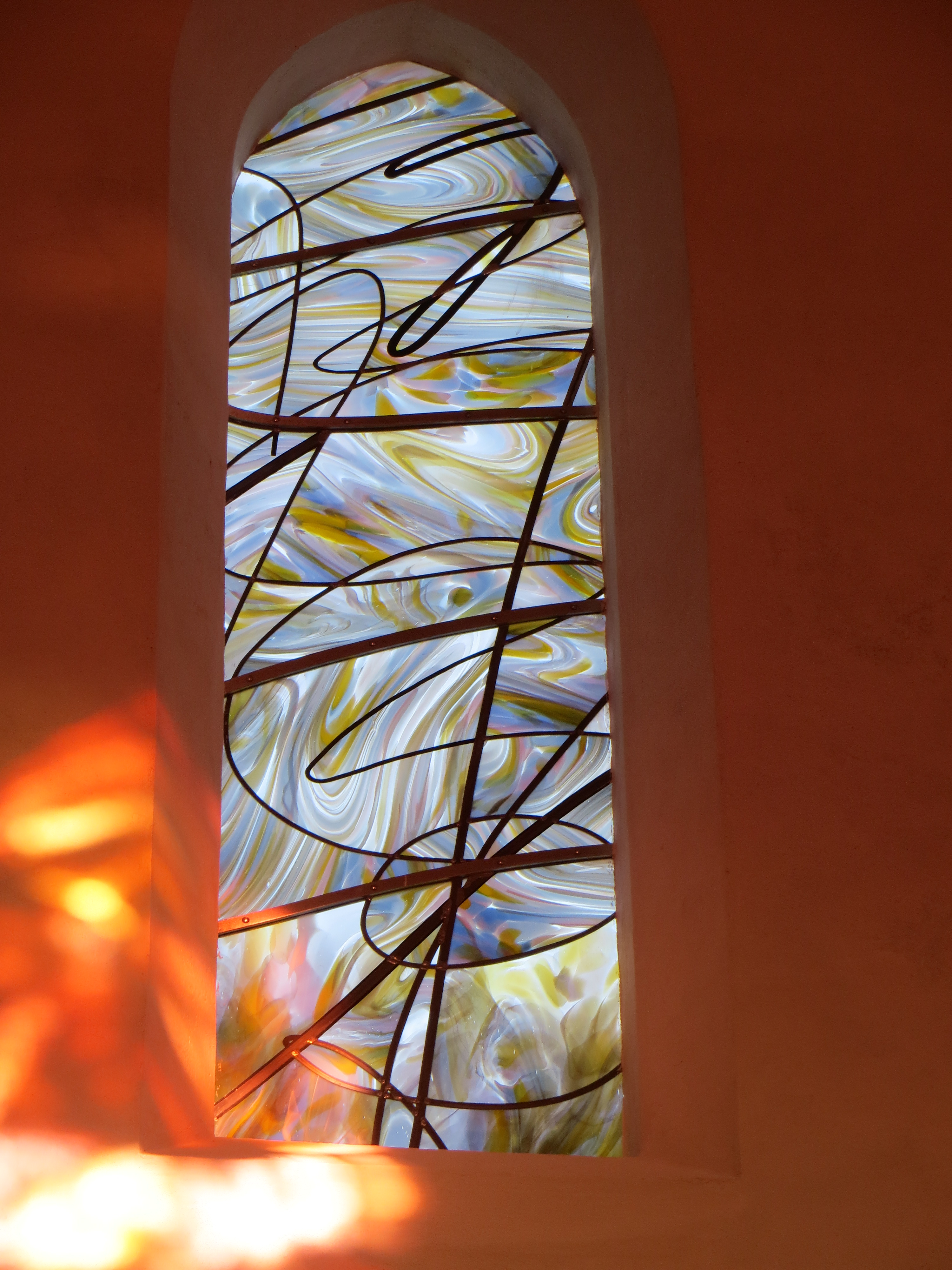 vitrail au plomb contemporain